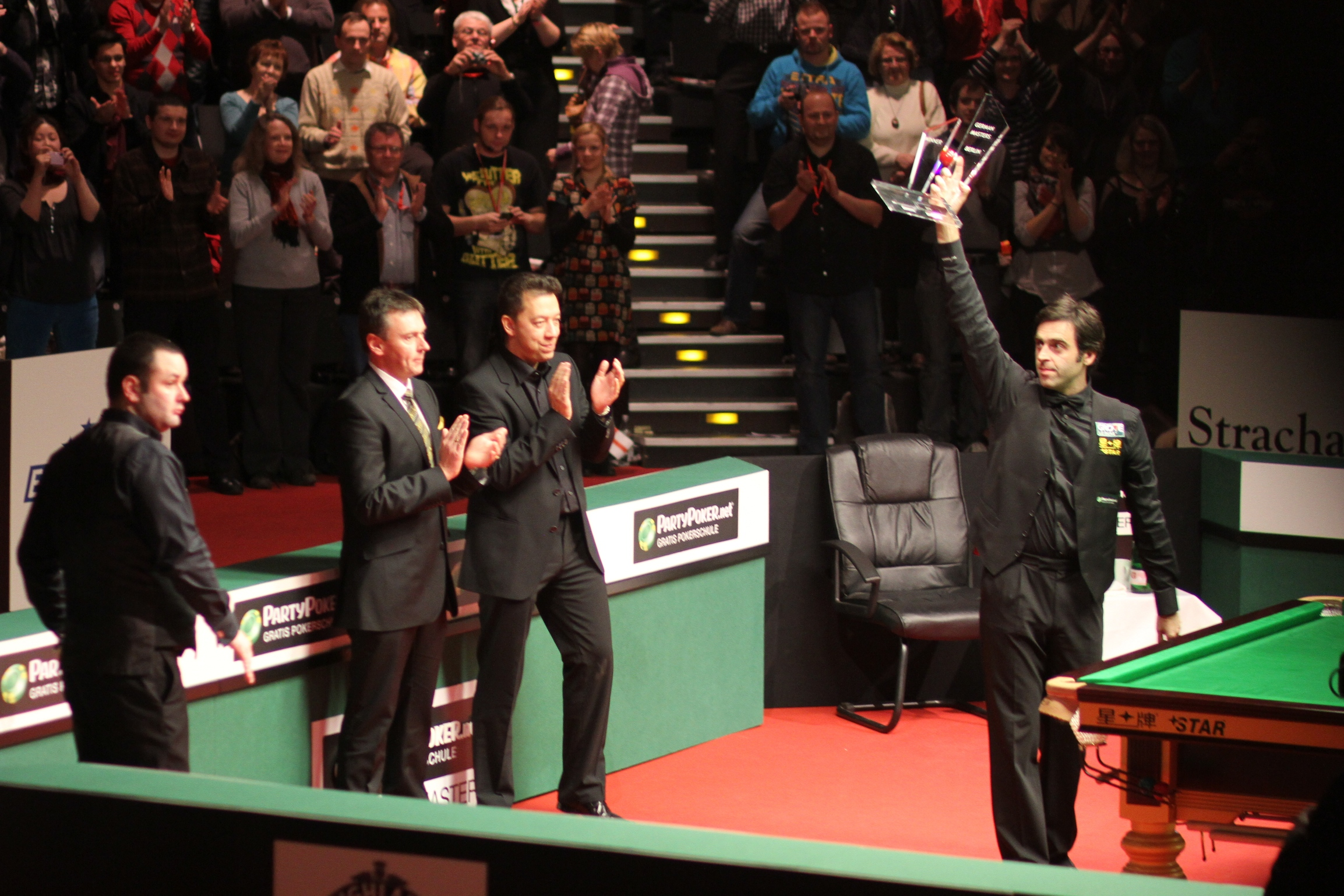 Ronnie O’Sullivan hält den gerade gewonnenen Pokal des German Masters 2012 Snookerturniers im berliner Tempodrom. Ganz links sein Gegner Stephen Maguire.